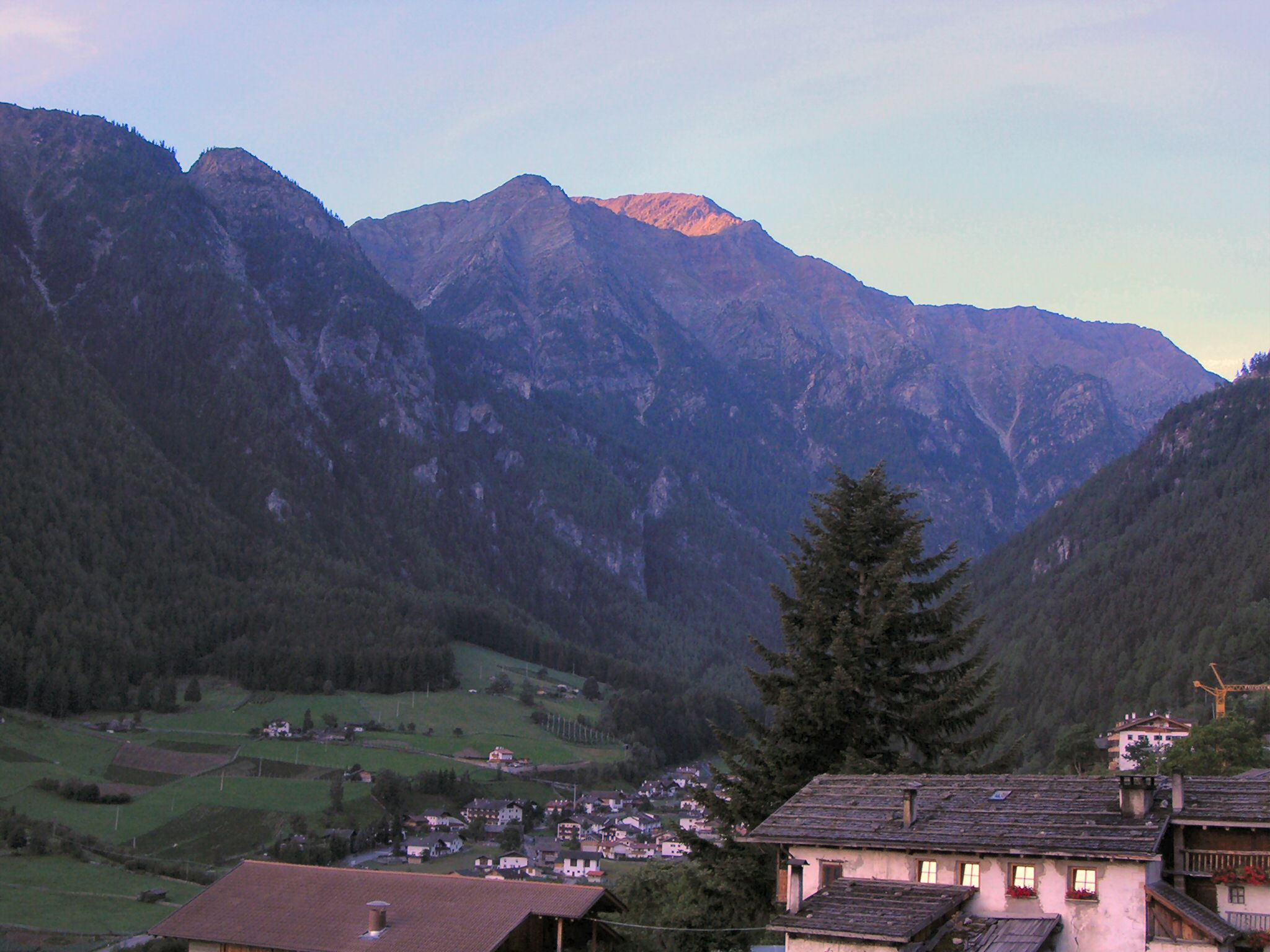 Panorama in Val Martello (BZ) Foto scattata da --L'uomo in ammollo 22:08, Ago 15, 2005 (CEST)